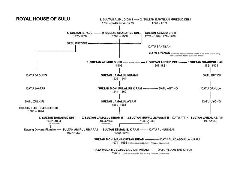 Sulu Sultanite sugupuu